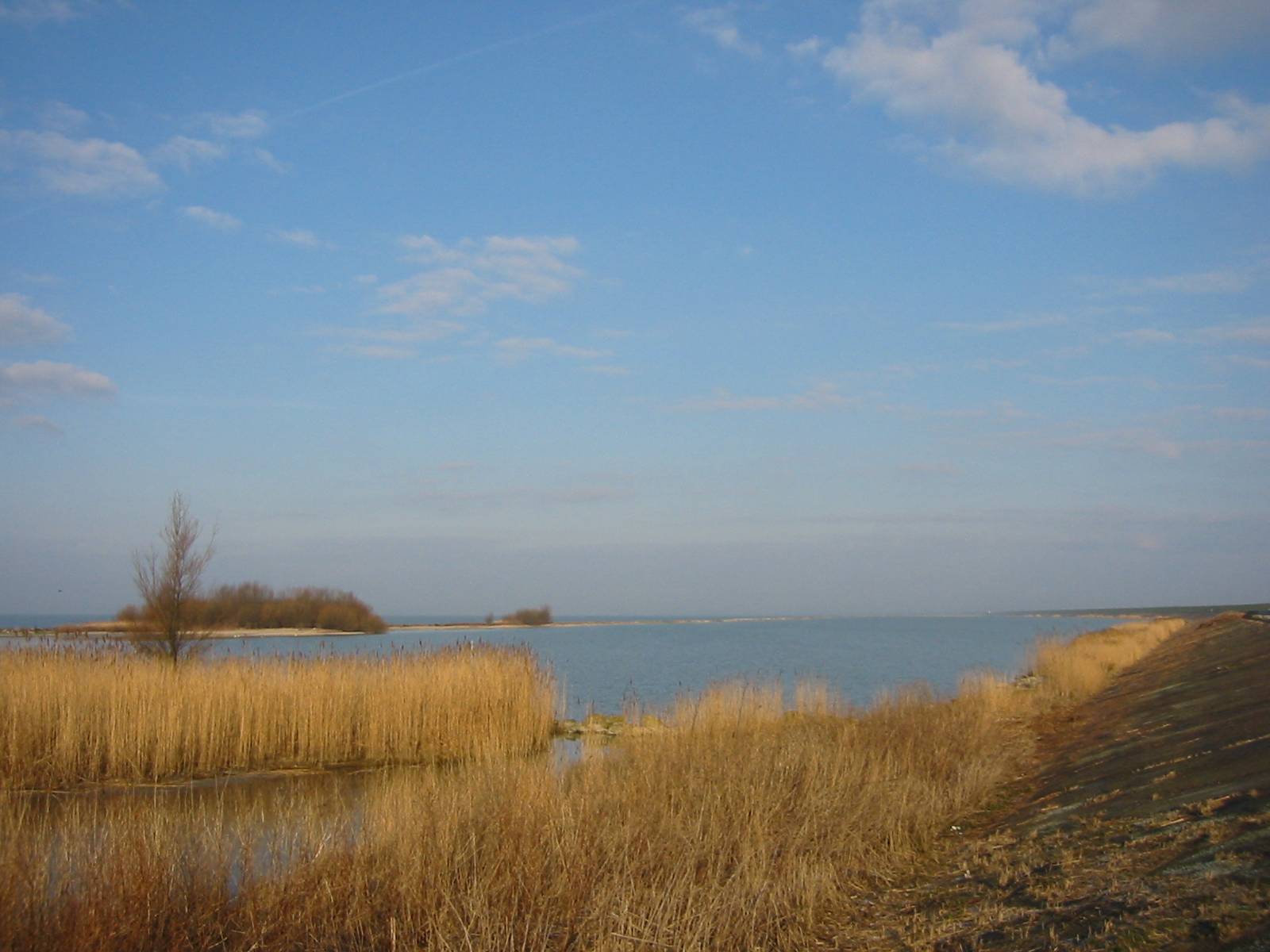 Eigen foto; langs "houtribdijk" op de helft bij het haventje. MarkermeerkantGerardM 3 mrt 2004 17:28 (CET)